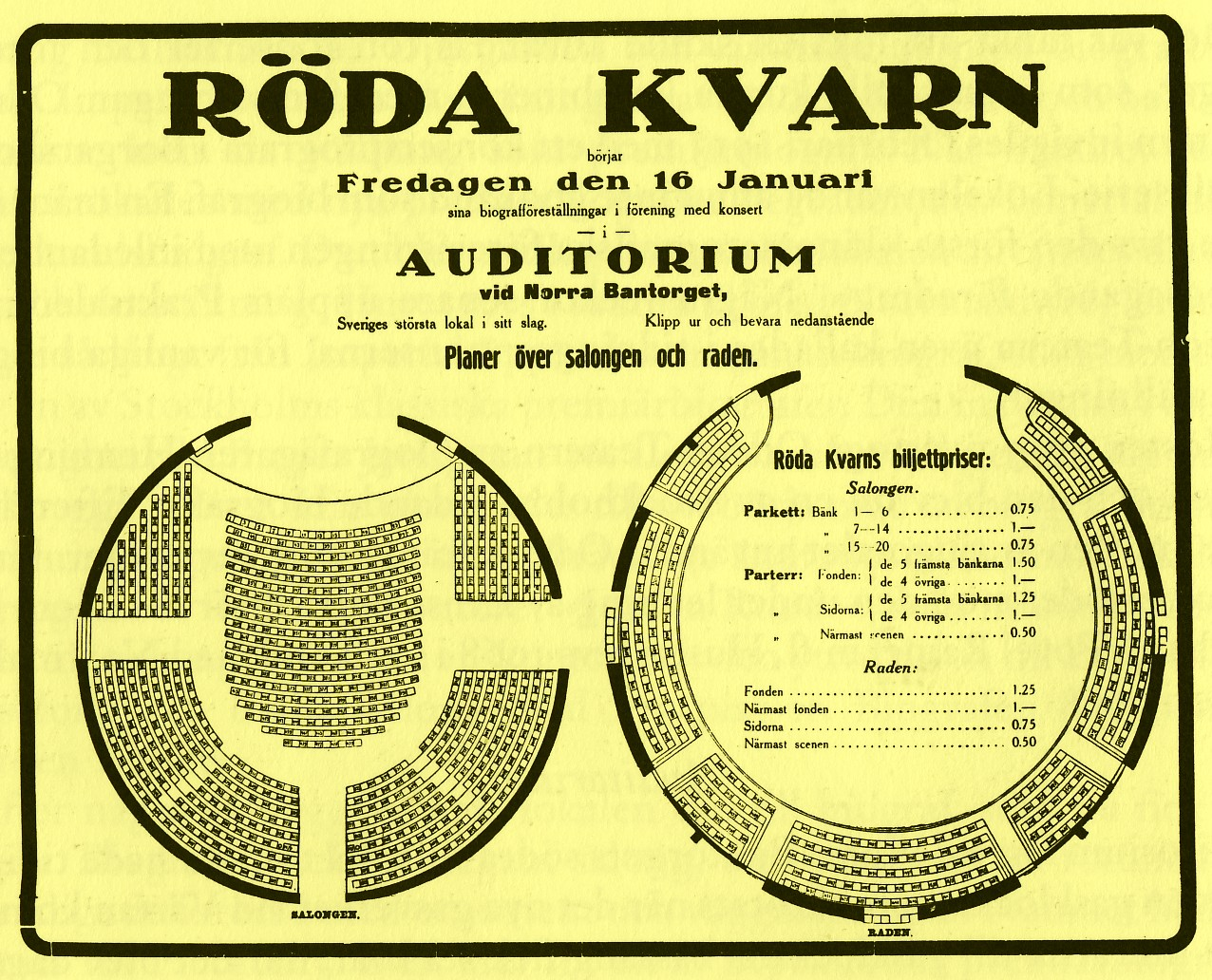 Plan till "Röda Kvarn" i "Auditorium" (senare Vinterpalatset) i Stockholm